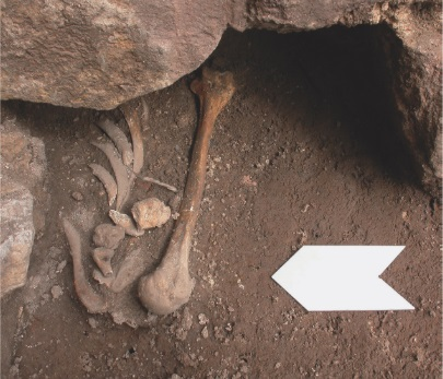 Ausgrabungen Kirche Nidderau-Eichen, Main-Kinzig-Kreis, Hessen, Deutschland